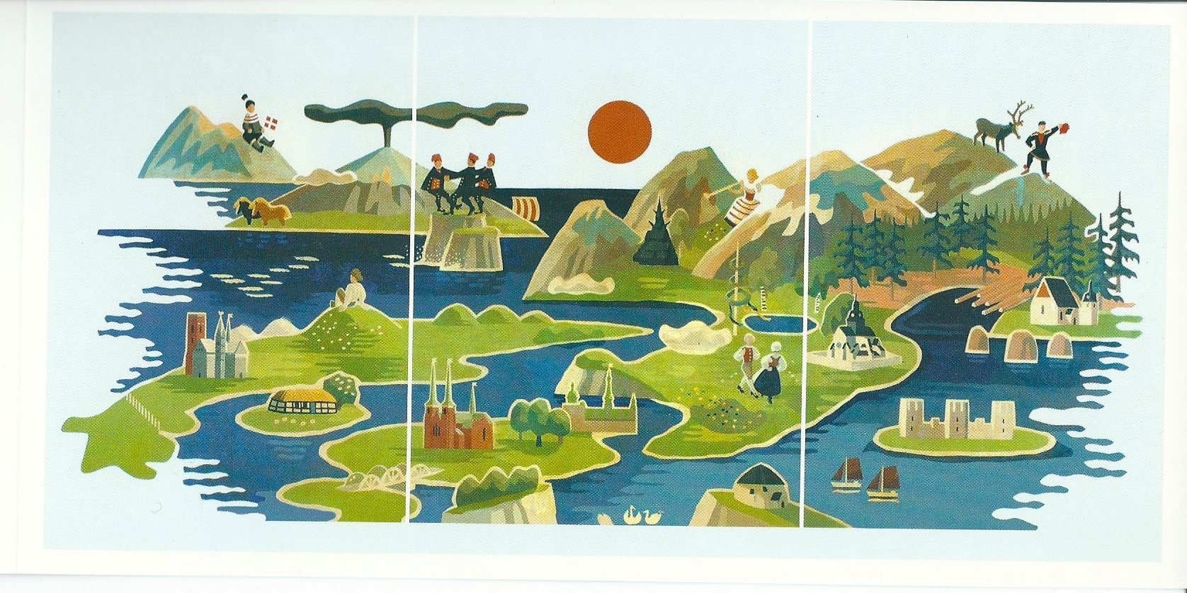 Jaruplund Højskole/Sydslesvig